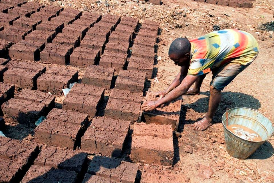 Fabriquer les briques aux Camps du Travail